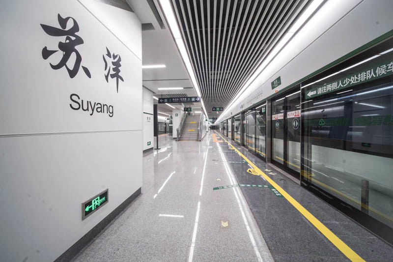 中文（中国大陆）: 苏洋站站台